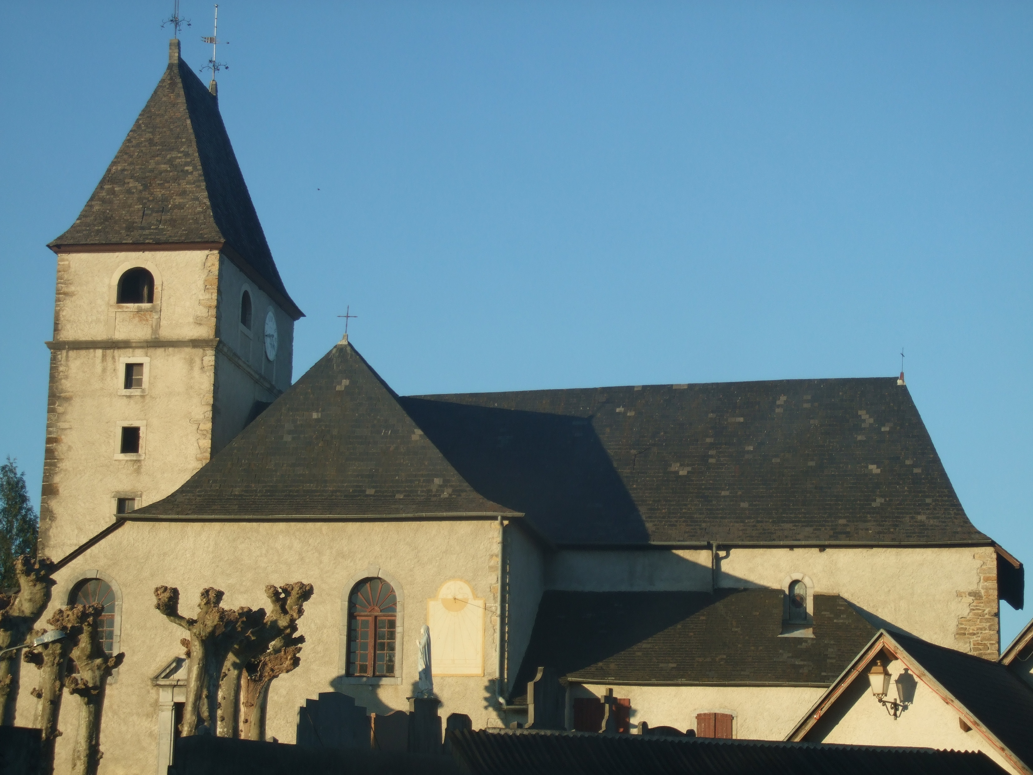 Eglise d Eysus